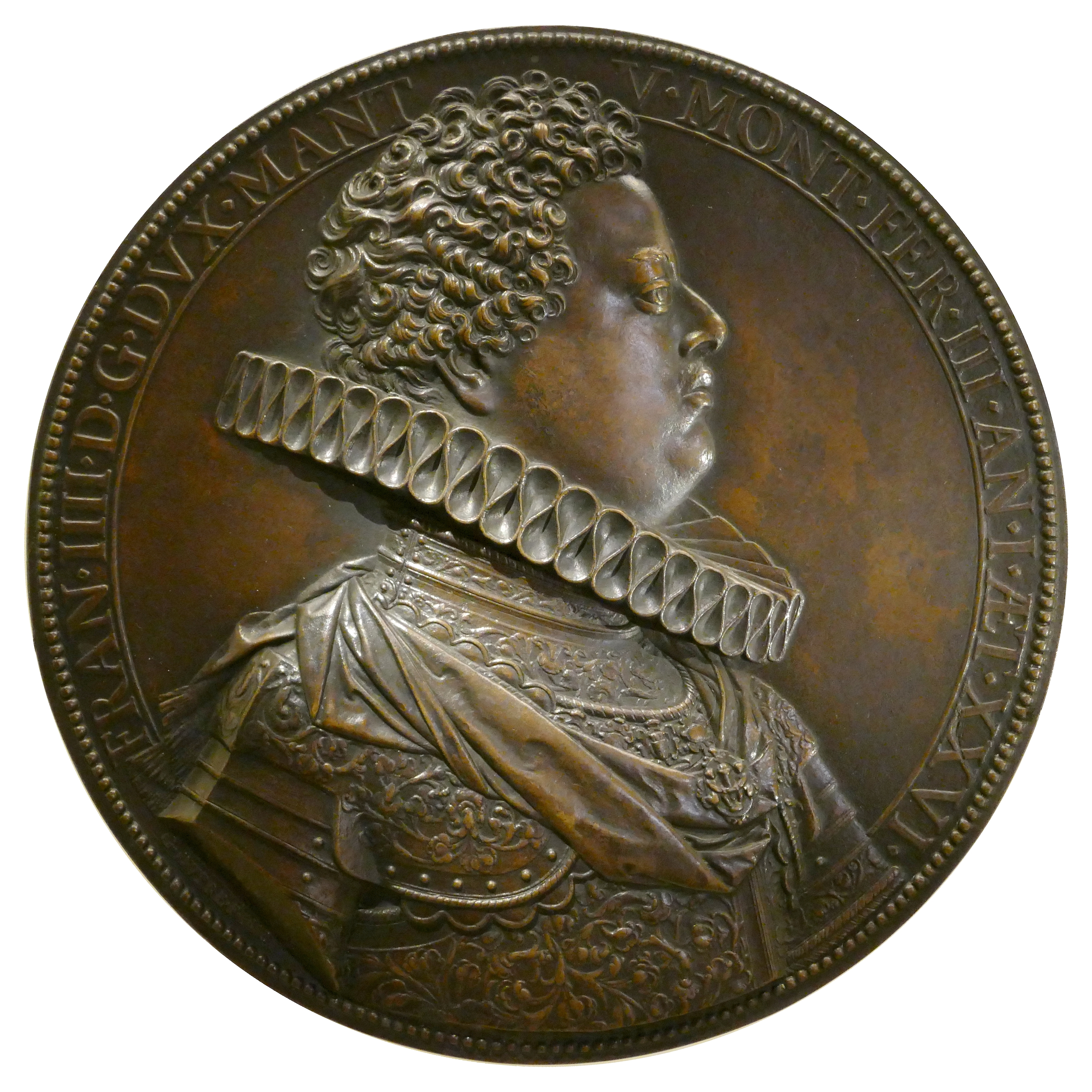 Médaille de bronze d'après un modèle de Guillaume Dupré (Sissonne, vers 1576 - Paris, 1643), Francesco IV Gonzaga (François IV de Mantoue) (1586-1612). Diamètre environ 12 cm, collections du musée Petit-Palais, Paris.